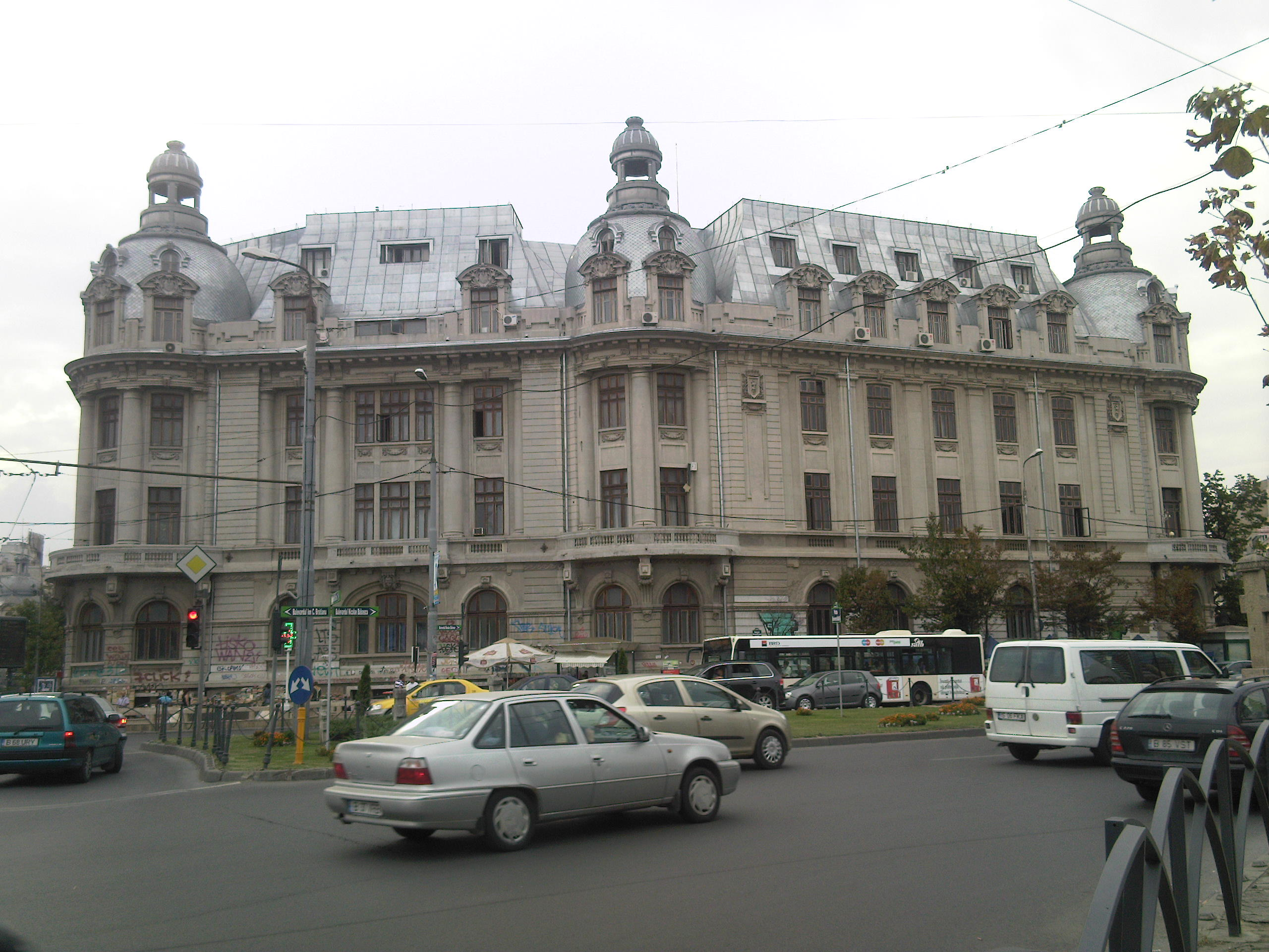 Universitatea București